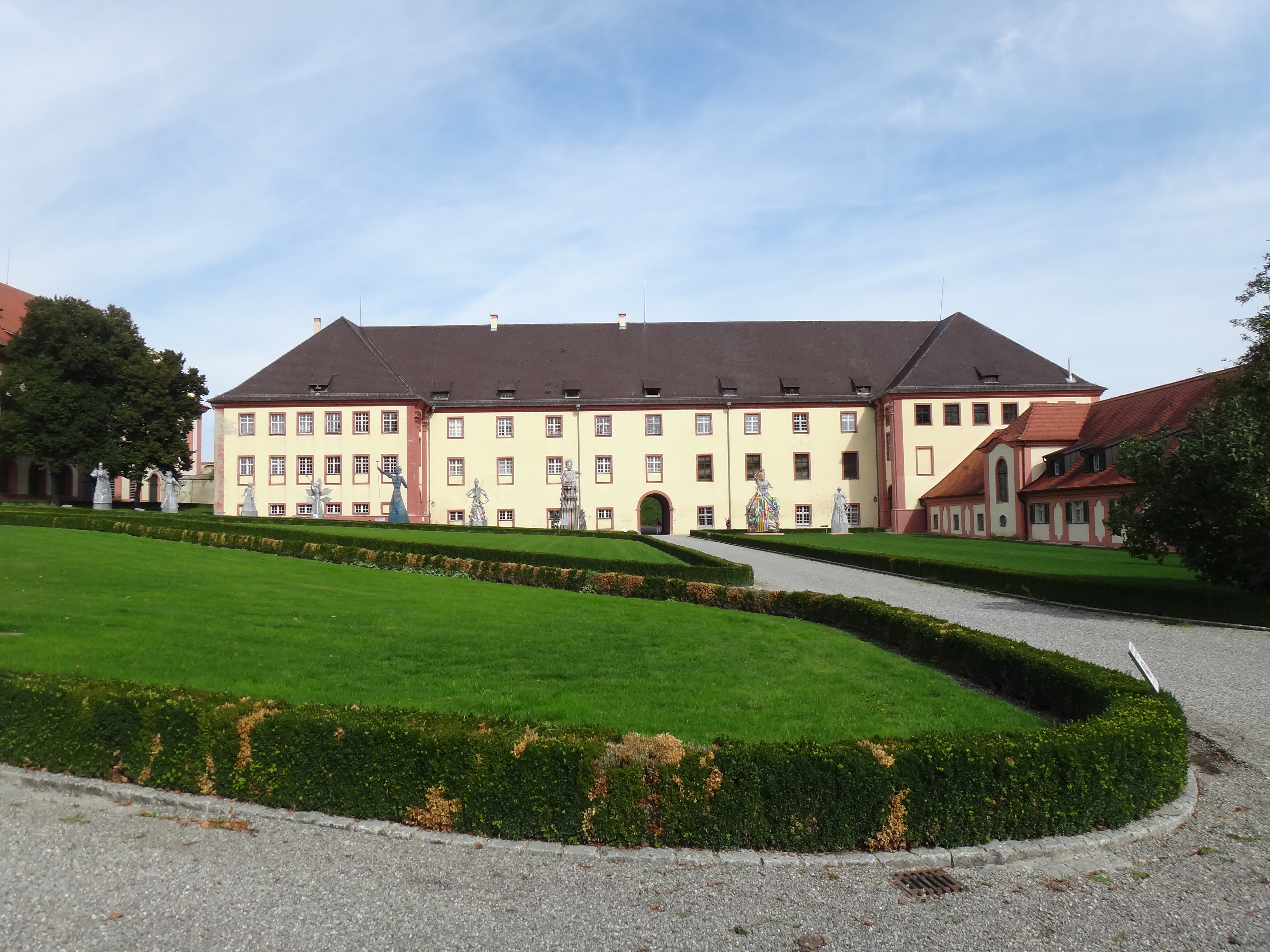 Marstall Schloss Altshausen